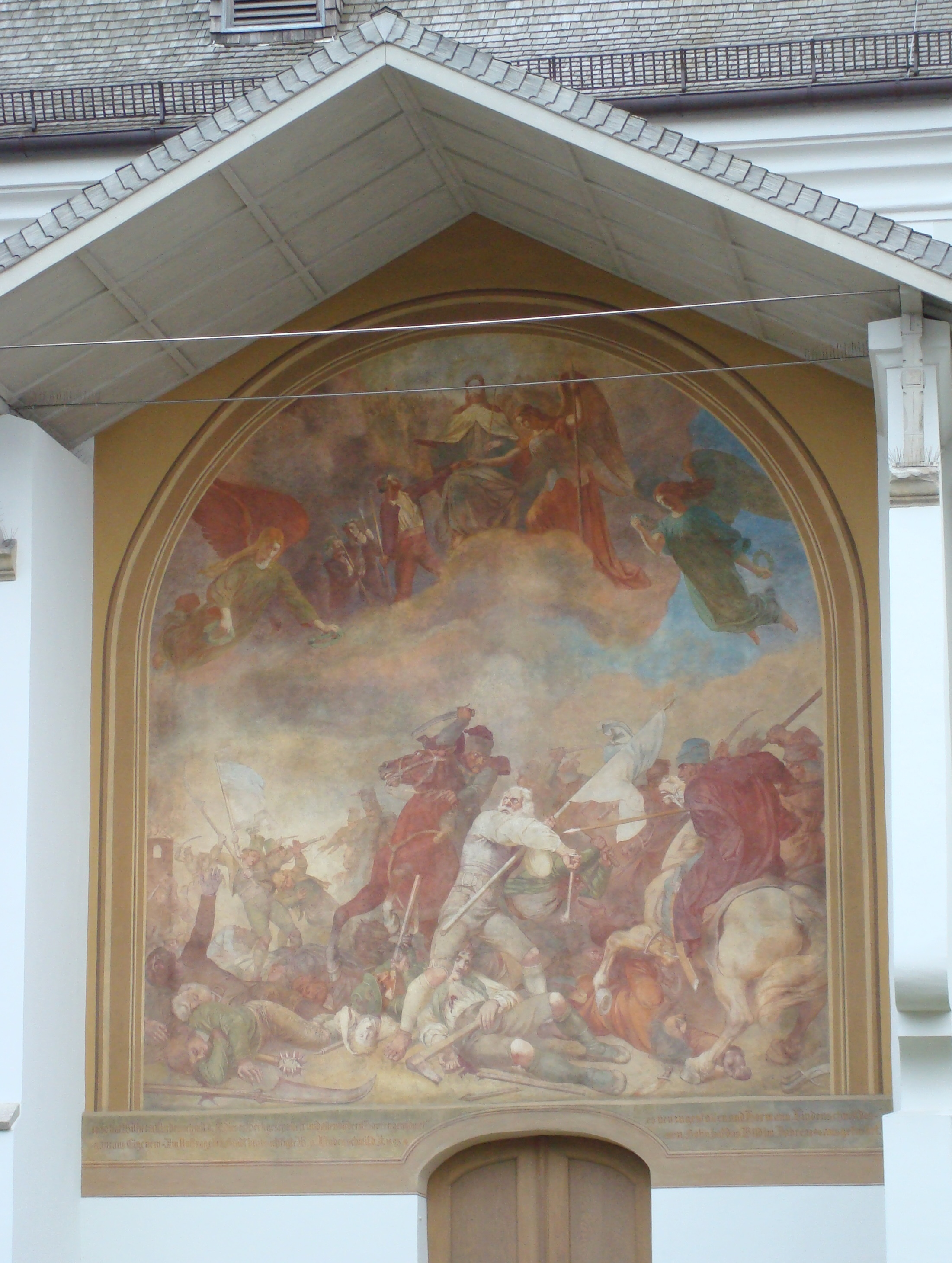 Fresco "Die Bauernschlacht von Sendling 1705" by Wilhelm Lindenschmit der Ältere on northern Facade of Old Church St. Margaret in Munich/Sendling